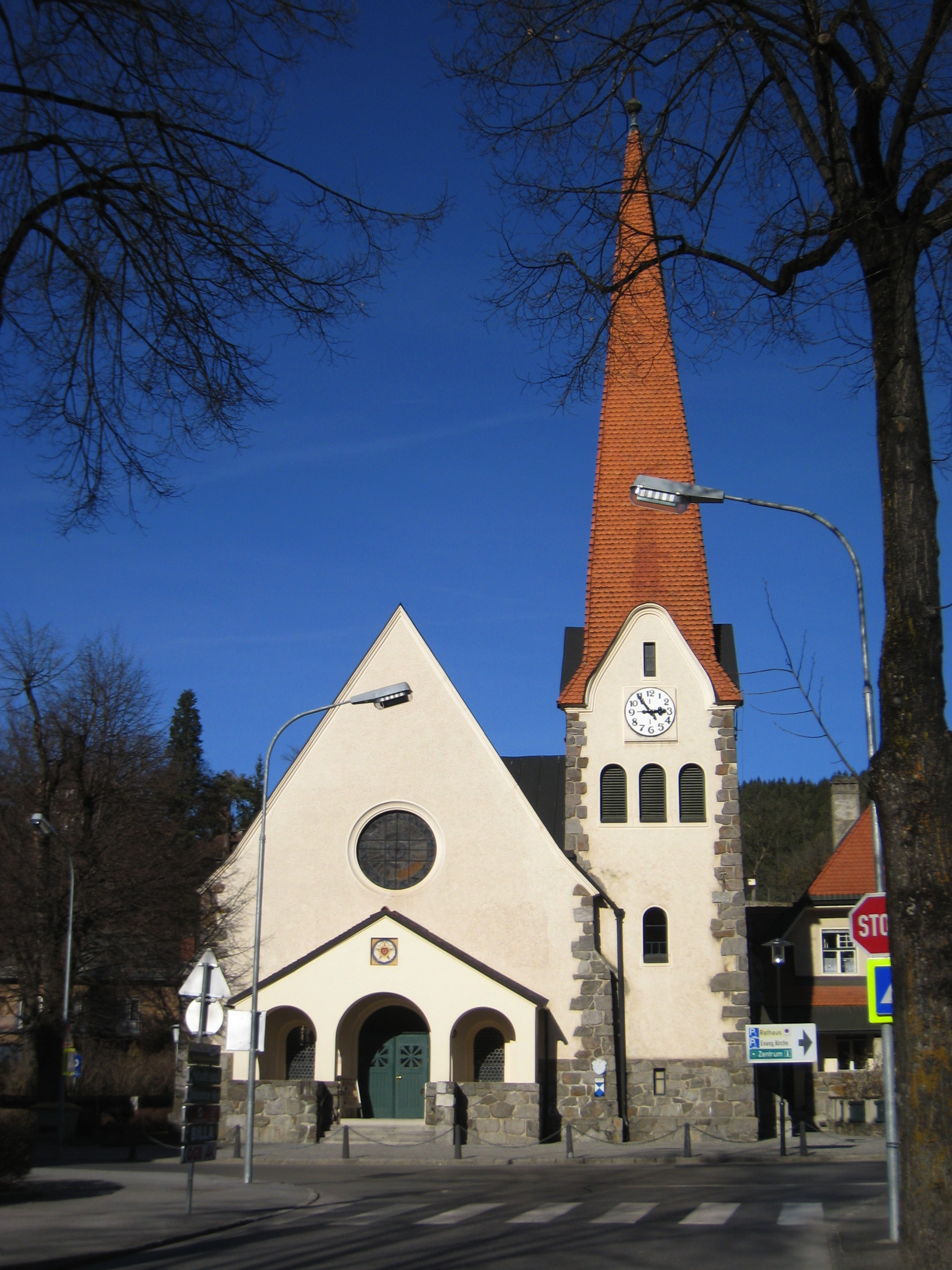 Martin Lutherkirche in Spittal an der Drau